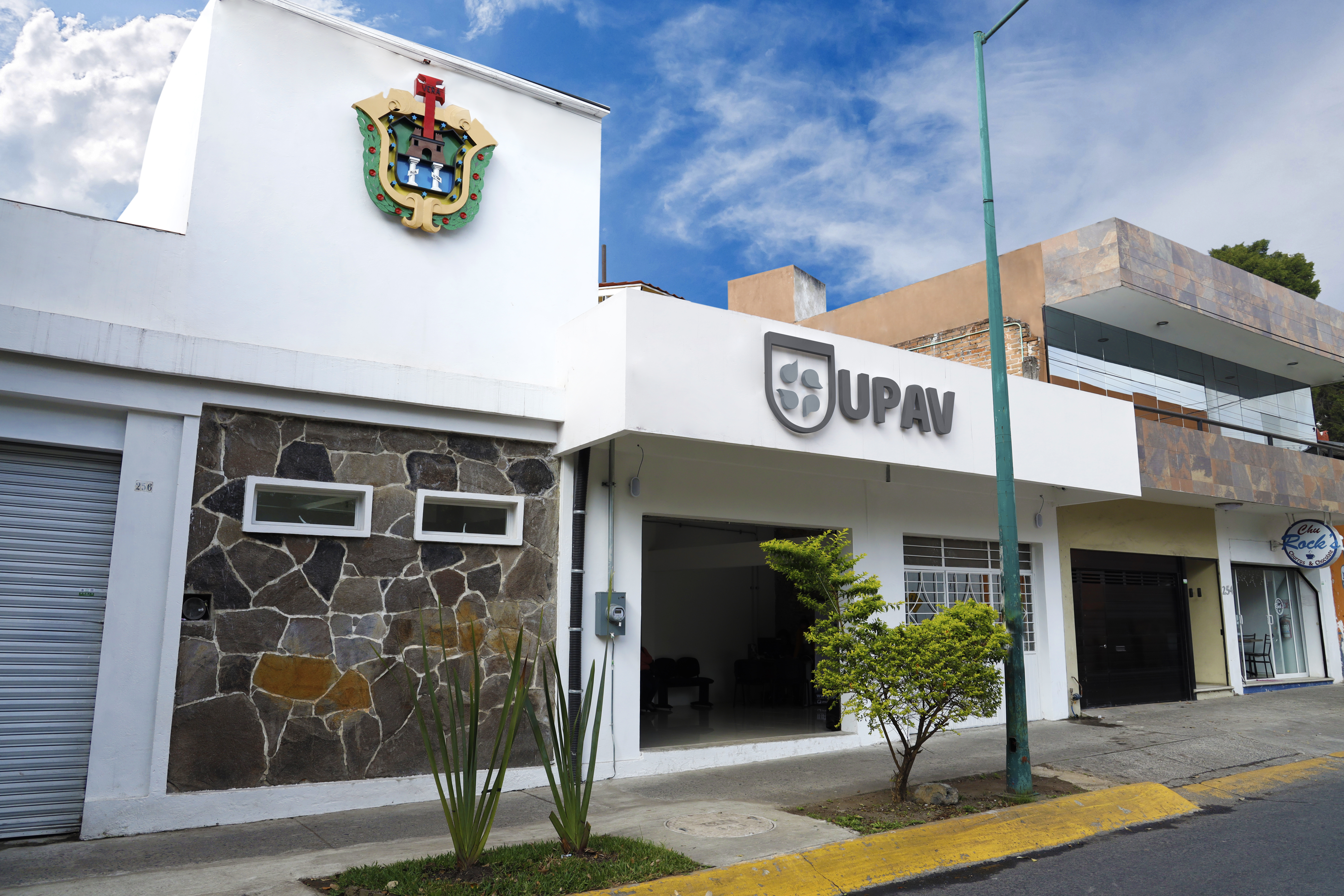 Fachada de Oficinas Universidad Popular Autónoma de Veracruz